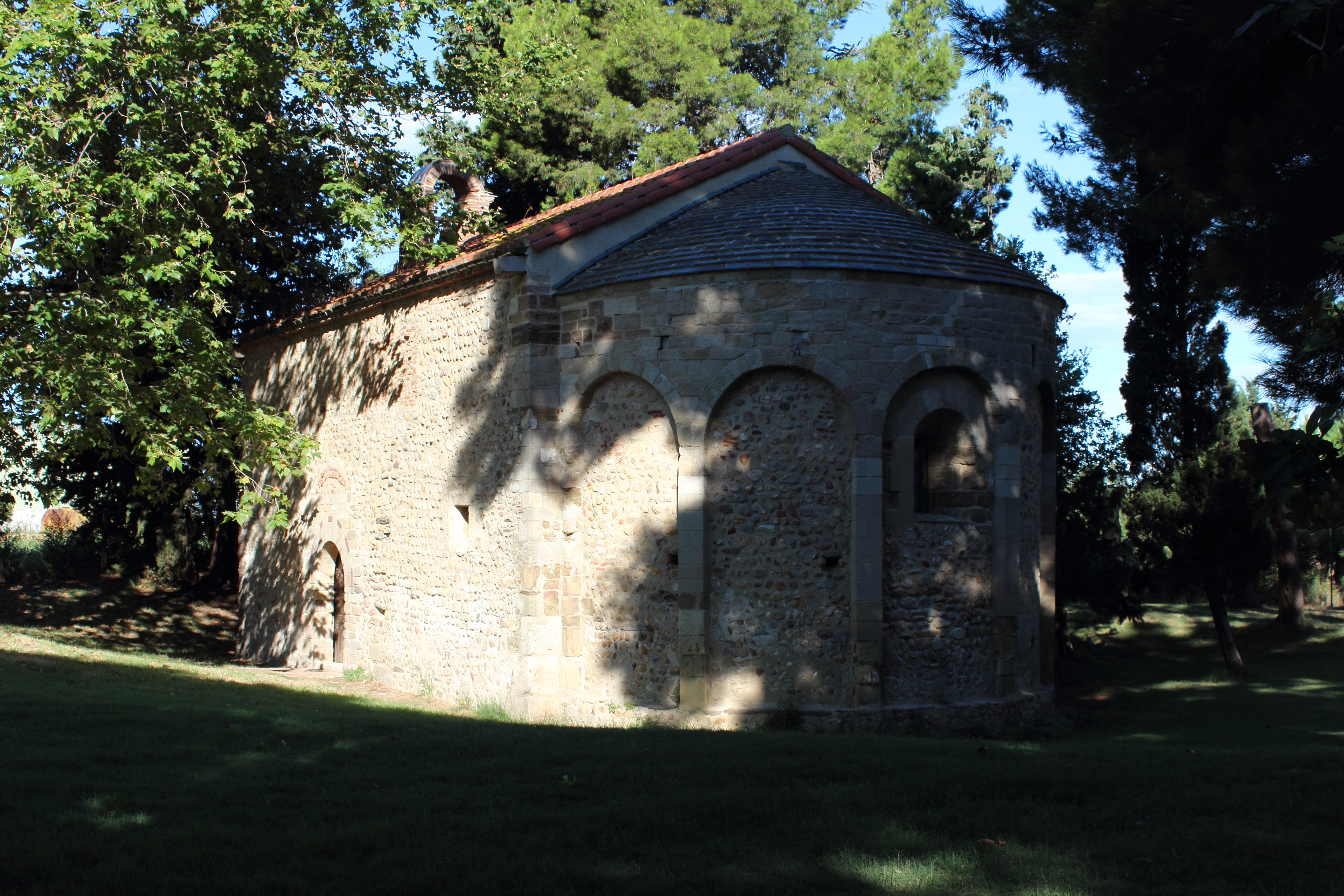 Église Saint-Étienne de Vilarasa, abside et nef